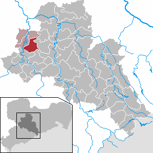 Seelitz in Saxony - district Mittelsachsen